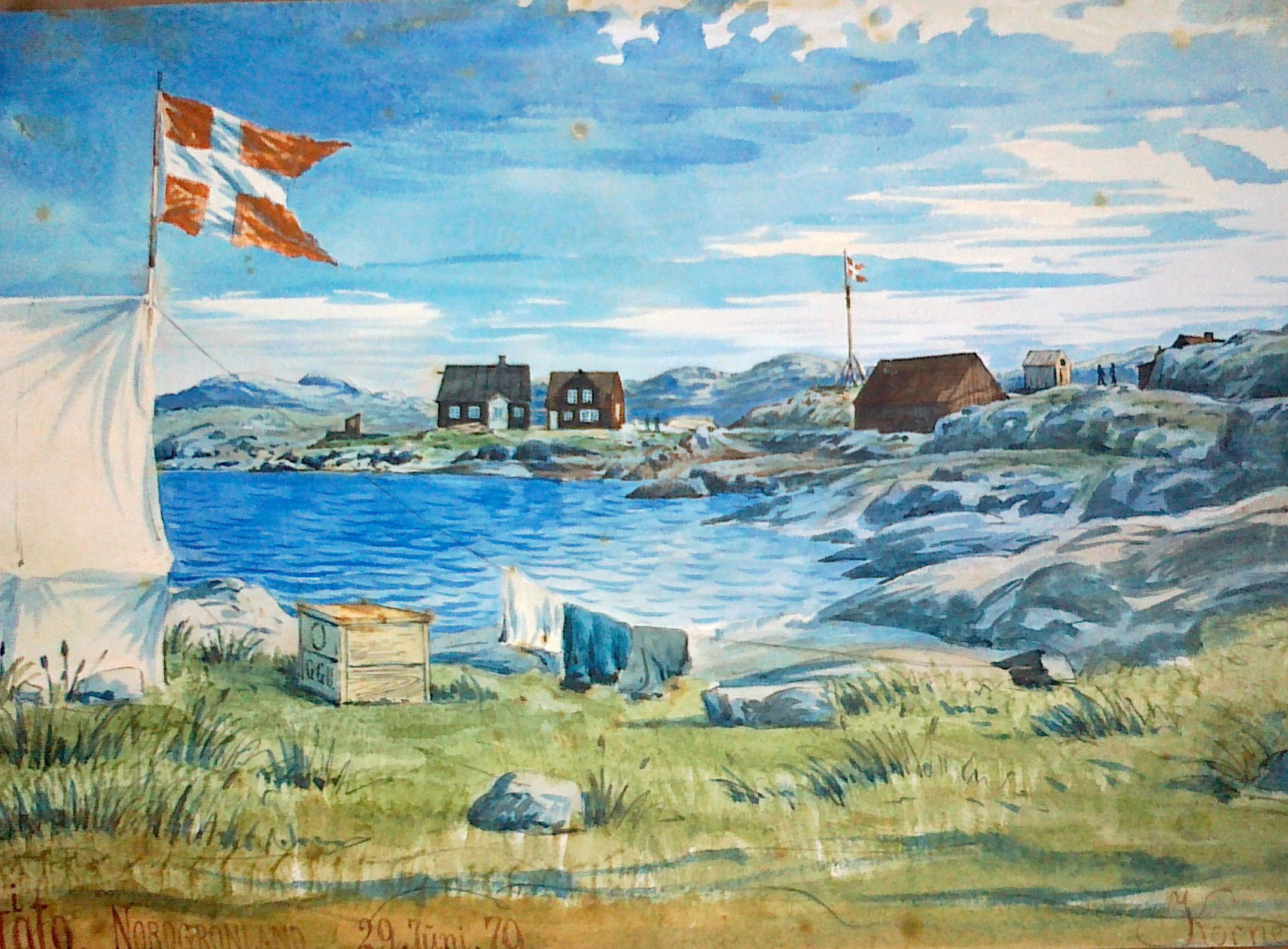 "Aigto, Nordgrønland. Egedsmindes Distrikt" Tegning af Andreas Kornerup, 29 juni 1879.